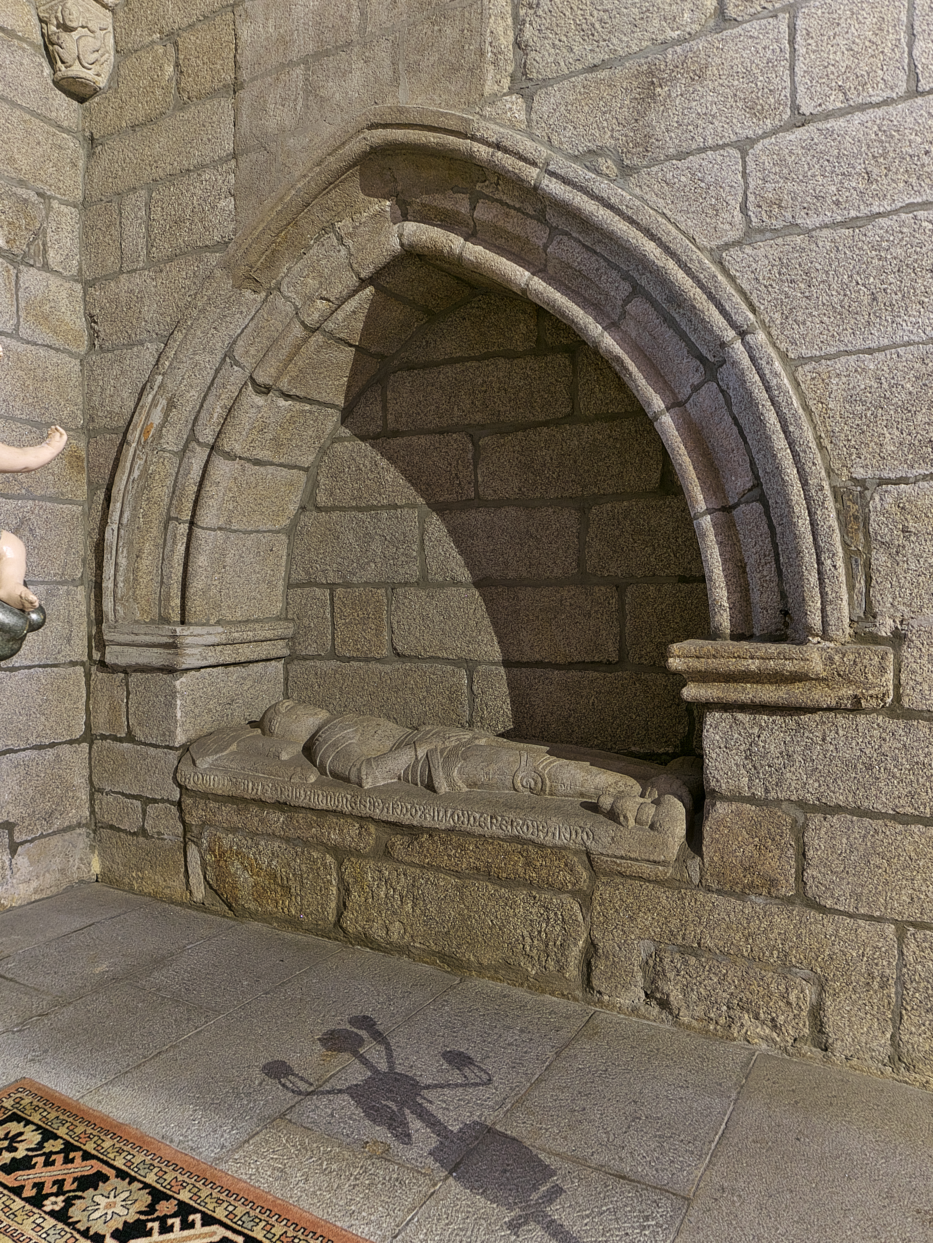 Brazo norte del crucero de la Iglesia de San Francisco, Betanzos